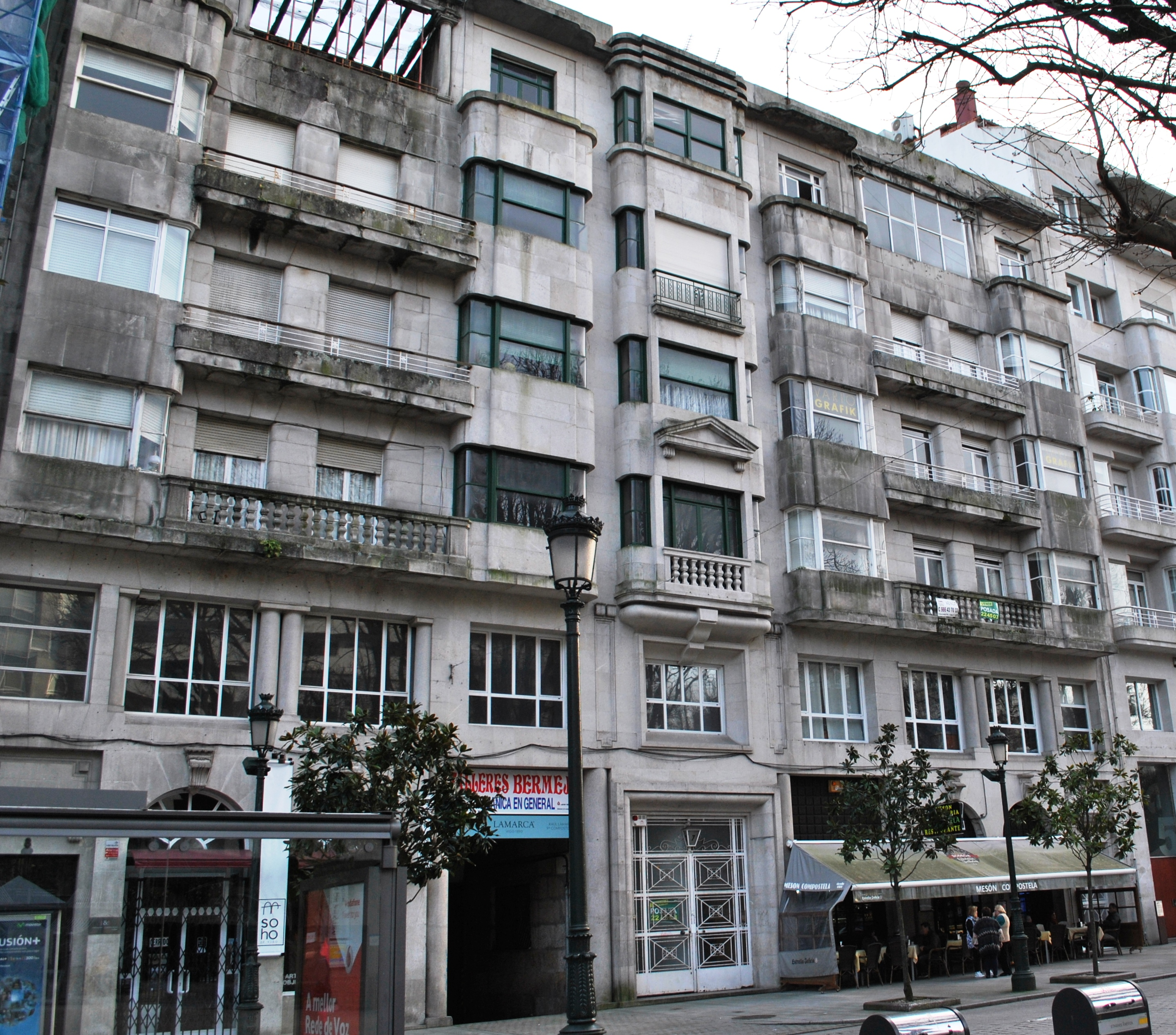 Véxase o título e as categorías